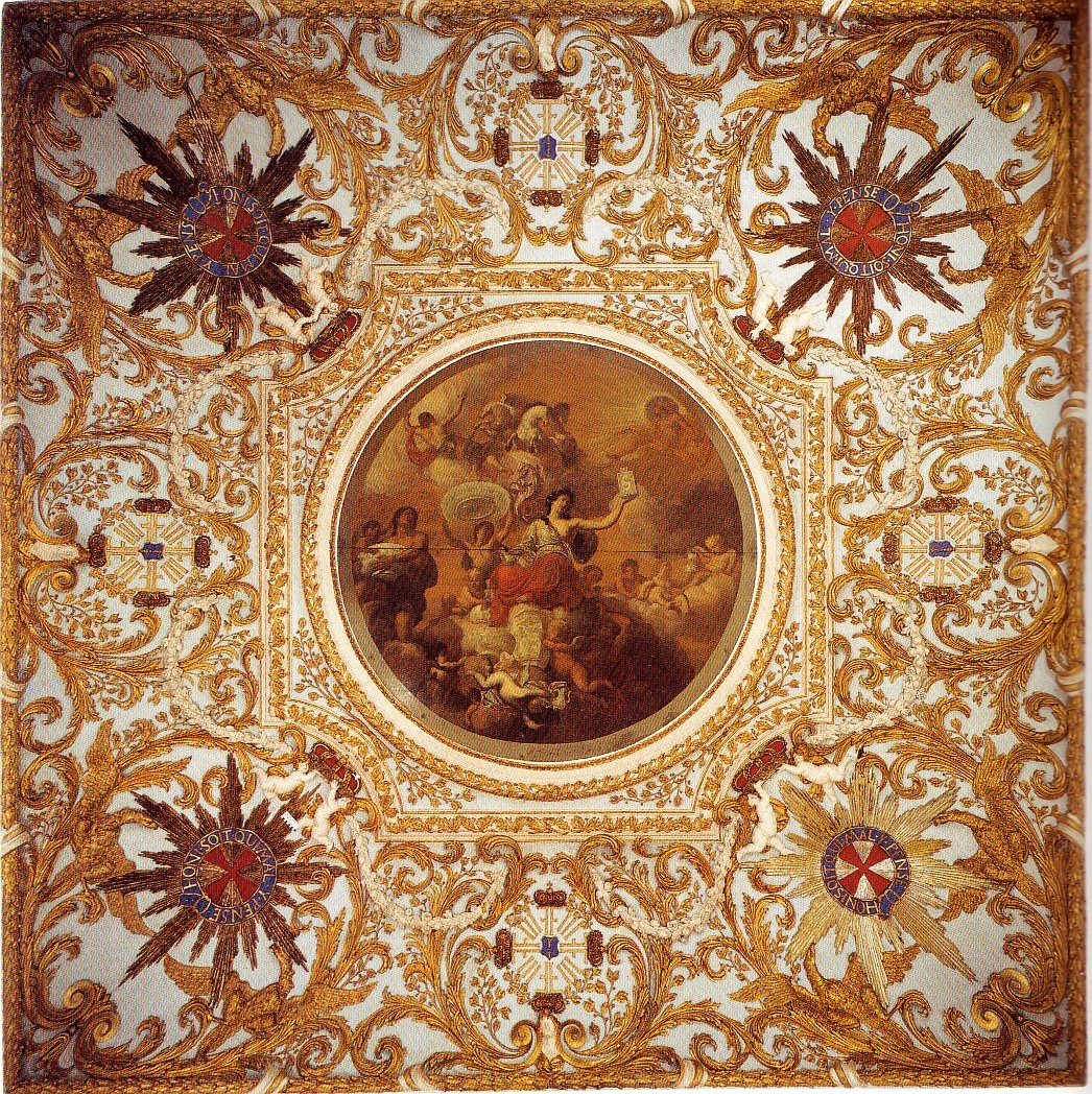 Deckengemälde